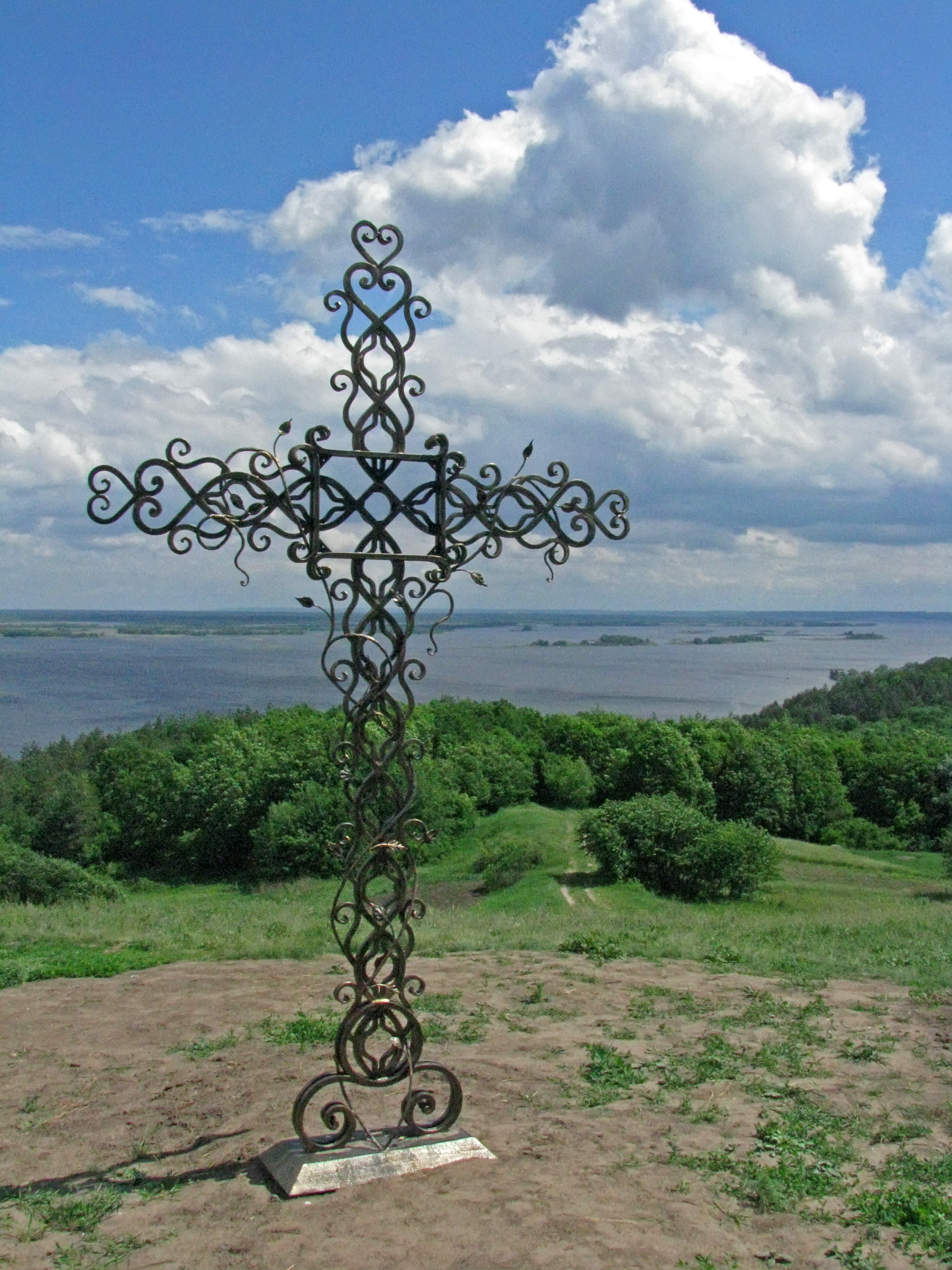 Городище літописного міста Святополча, село Витачів